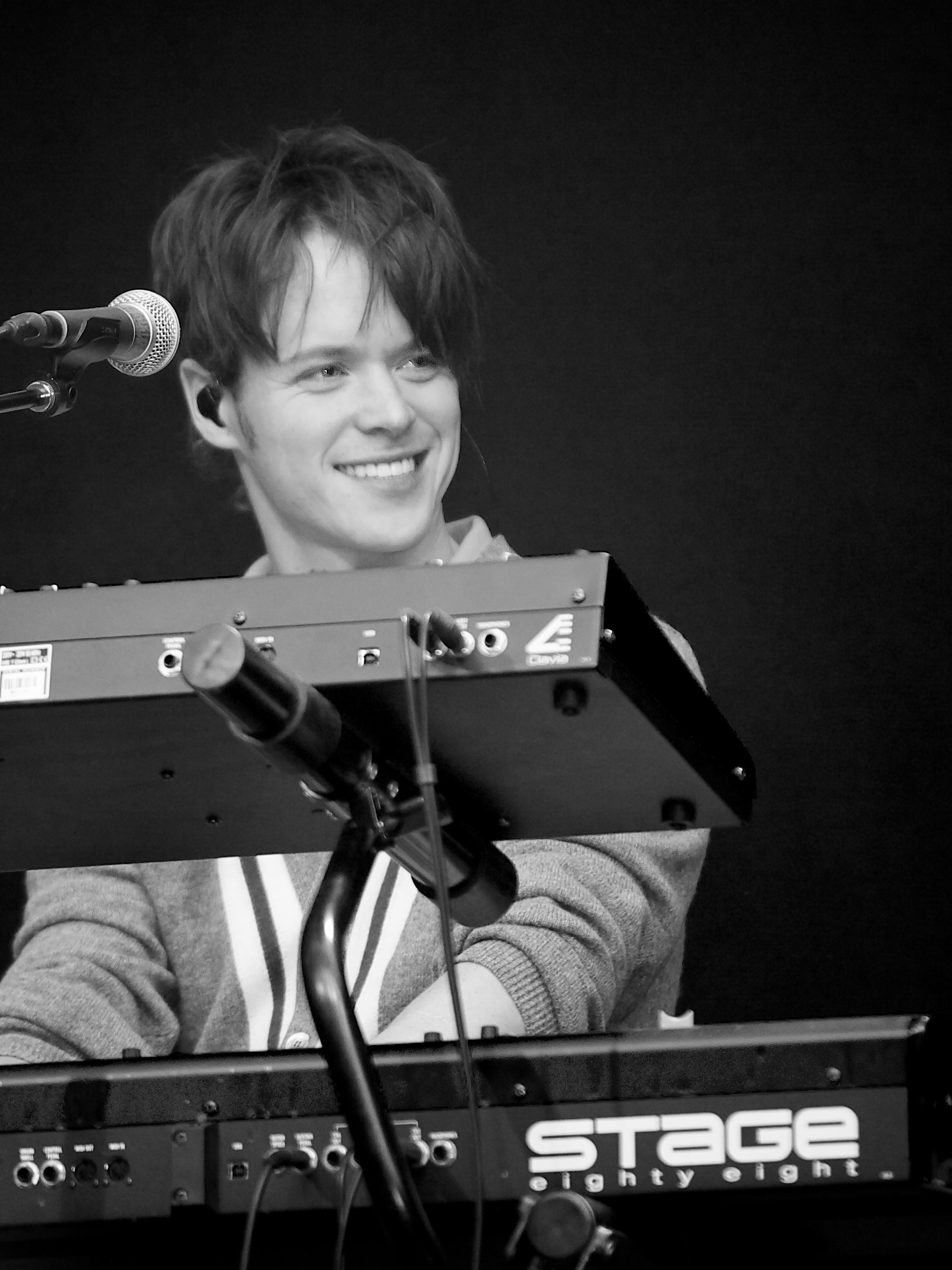 Kent Sundberg, Donkeyboy